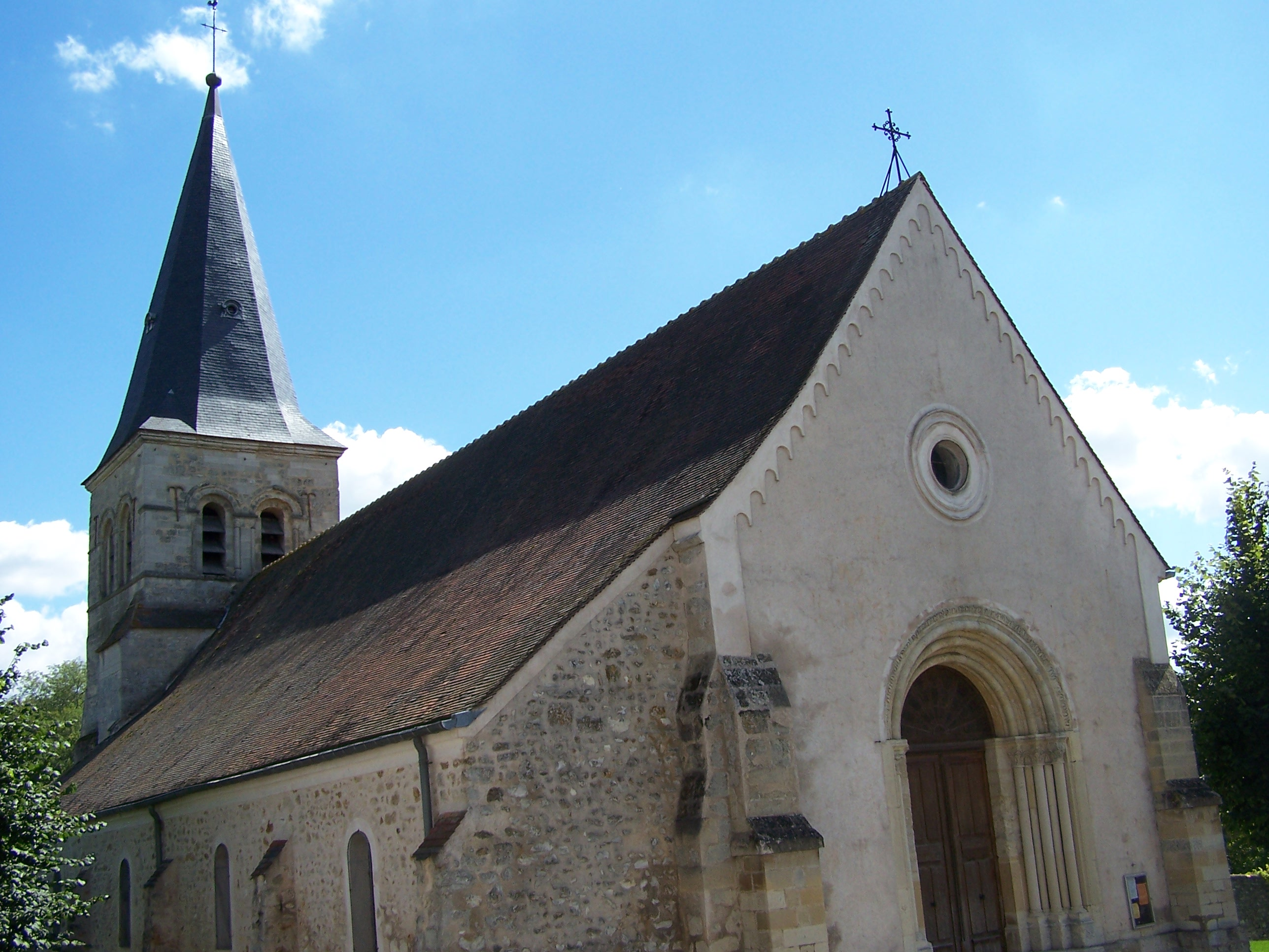 Église de Crespières (Yvelines, France). Photo personnelle. Church of Crespières (Yvelines, France). Personal photo. Auteur/Author : ℍenry Salomé